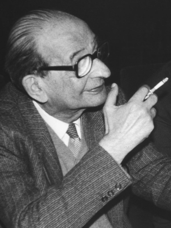 Şerban Ţiţeica (1908-1985), Romanian physicist